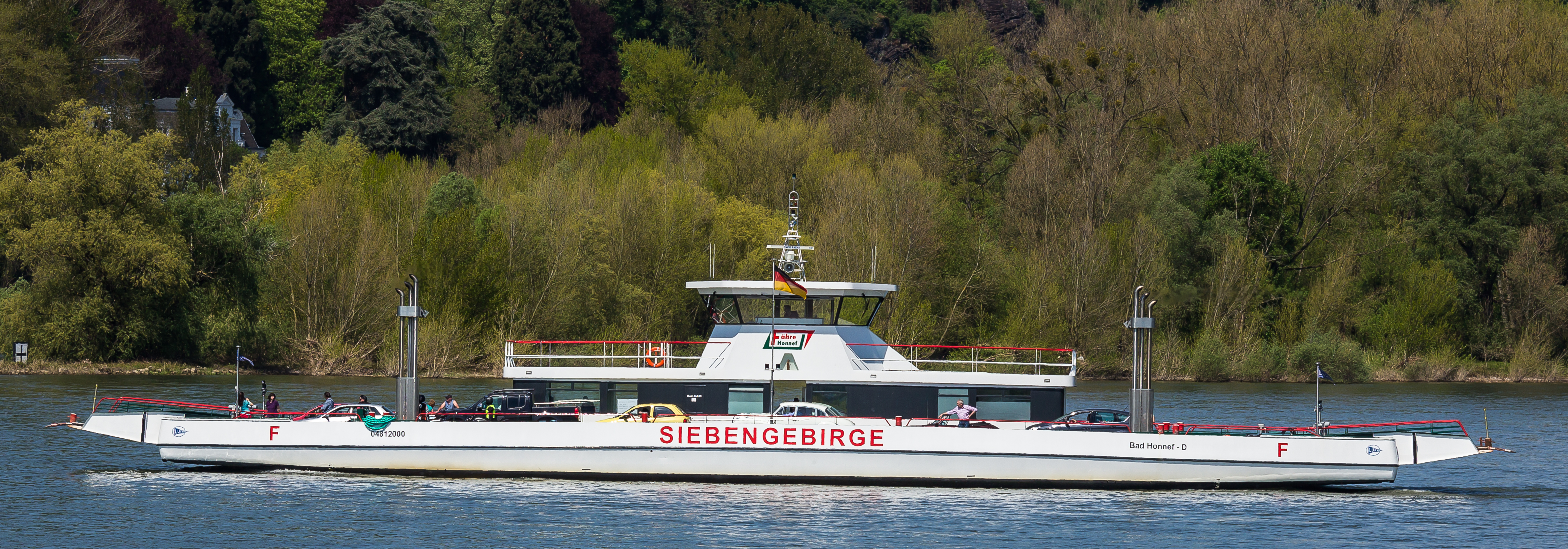 Rheinfähre „Siebengebirge“ (ENI 04812000) auf der Überfahrt von Bad Honnef nach Rolandseck